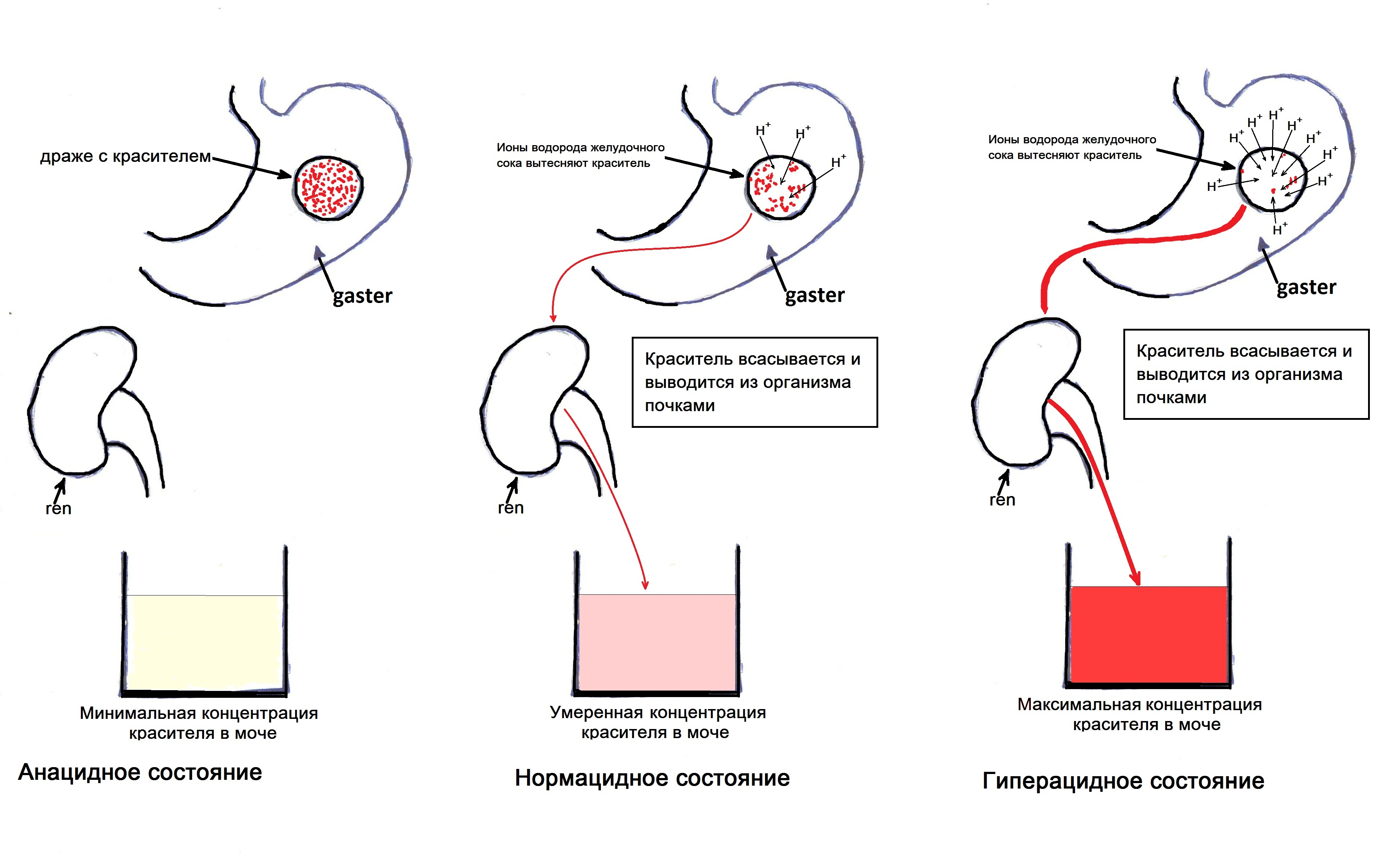 На рисунке отображен принцип проведения ацидотеста. Принцип методики заключается в том, что краситель которым насыщены ионообменные смолы, вытесняется ионами водорода в кислой среде желудка. Далее краситель всасывается в толстой кишке и выделяется с мочой. Соответственно, интенсивность окрашивания мочи позволяет ориентировочно судить о кислотности желудочного сока: Анацидное состояние - ионы водорода в желудочном соке почти отсутствуют, соответственно краситель практически не вытесняется из ионообменных смол. Количество всосавшегося и выделившегося с мочой красителя незначительно. Цвет мочи соответствует разделению «В» на цветовой шкале. Гиперацидное состояние - ситуация противоположна: избыток ионов водорода практически вытесняют весь краситель из драже, чрезмерно всасывание и выведение красителя ведет к интенсивному окрашиванию мочи. Нормацидное состояние - состояние, расположенное посередине между двумя вышеописанными выше крайними состояними.